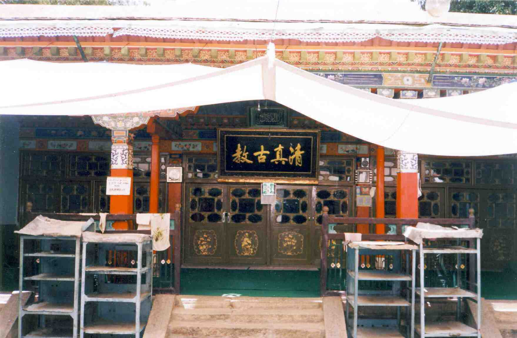 Entrance to old mosque in Lhasa.